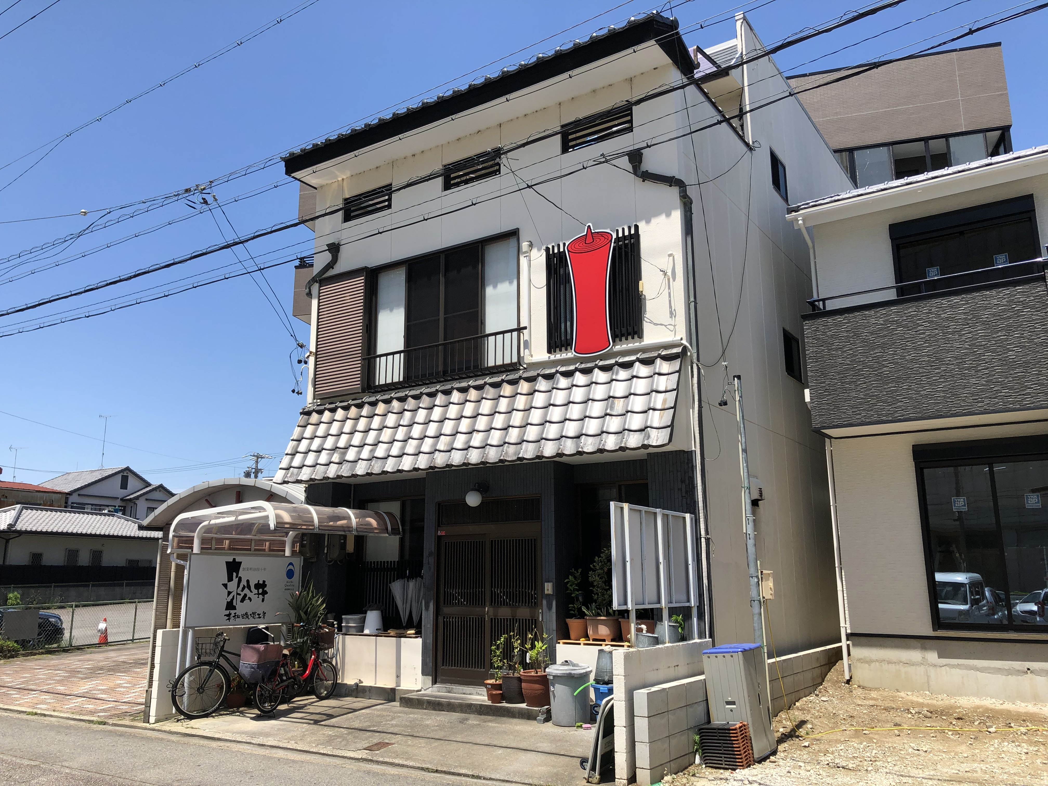 松井本和蝋燭工房（岡崎市十王町）